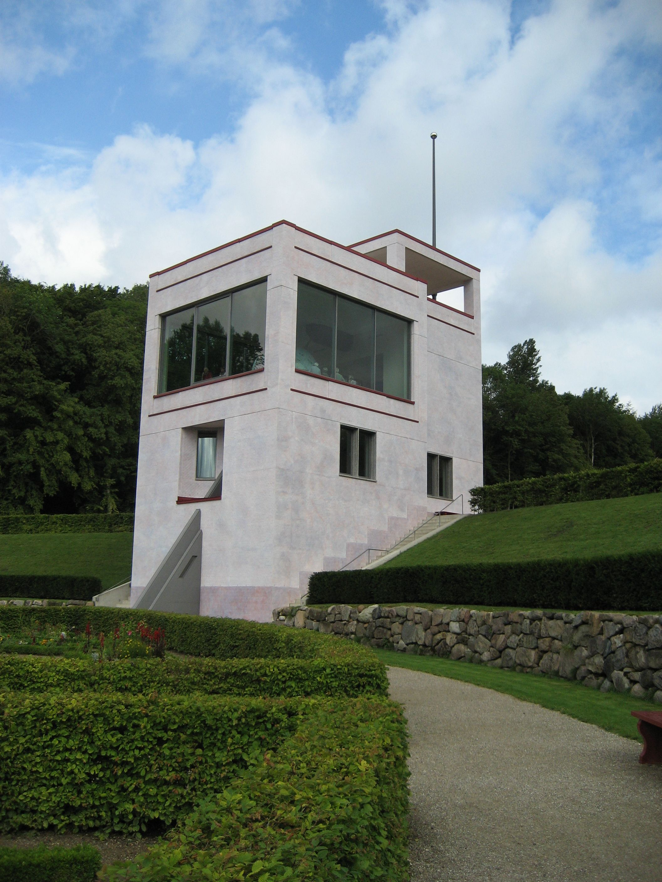 Außenansicht des Gottorfer Riesenglobushaus